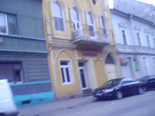 Casa gotică 1800 - 1850